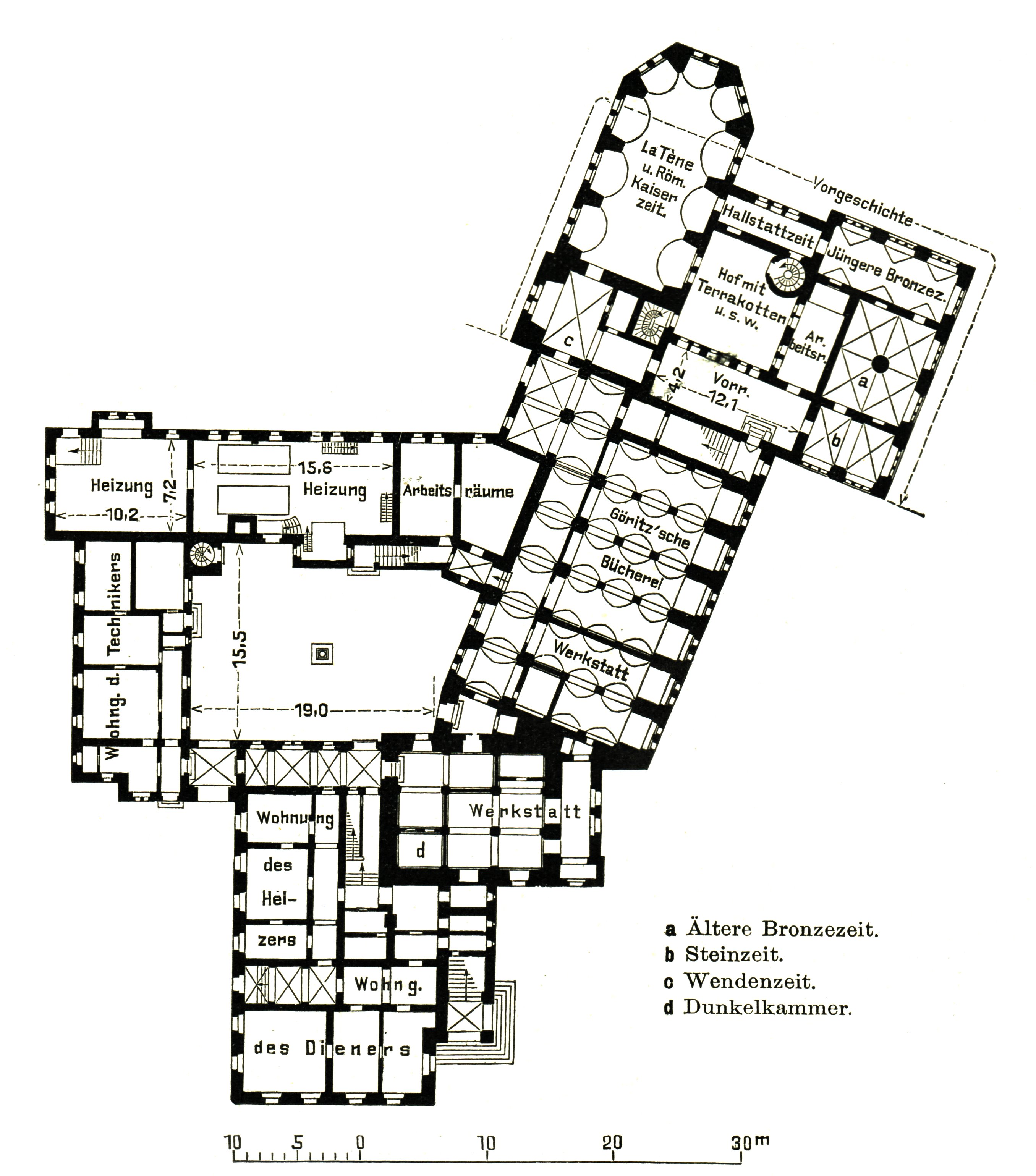 Berlin - Märkisches Museum, Grundriss Erdgeschoss